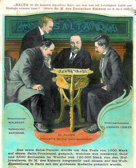 Salta-Turnier auf der Pariser Weltausstellung 1900: Es spielen u.a. Emanuel Lasker und Carl August Walbrodt auf einem von einem Juwelier gefertigten Prunkspiel. Ausschnitt aus einer Postkarte, detaillierte Beschreibung auf der Postkarte.